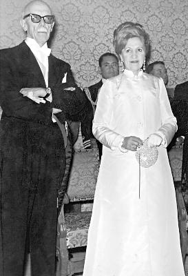 El presidente de la República del Ecuador, José María Velasco Ibarra y su esposa, la argentina Corina del Parral, en el Salón Amarillo del Palacio de Carondelet, en Quito.